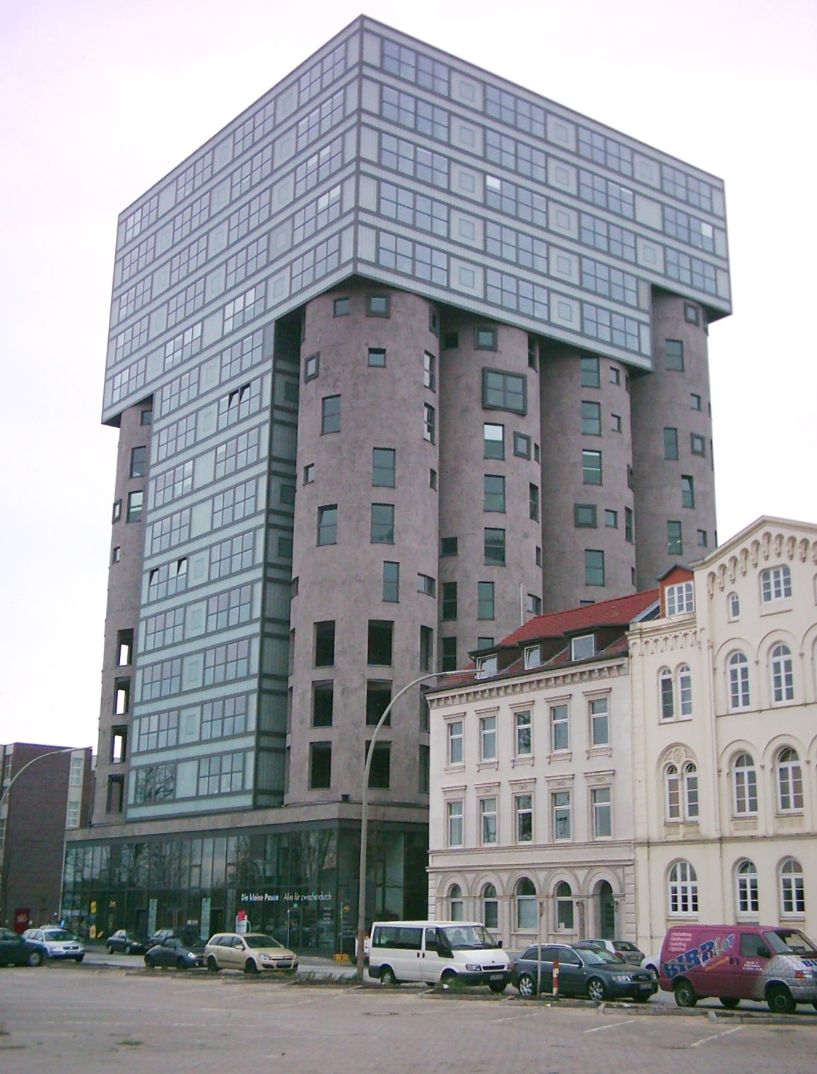 Das zum Bürogebäude umgestaltete ehemalige Getreidesilo am Schellerdamm in Hamburg-Harburg.